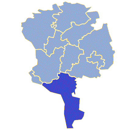 Powiat żarski - Gmina Przewóz